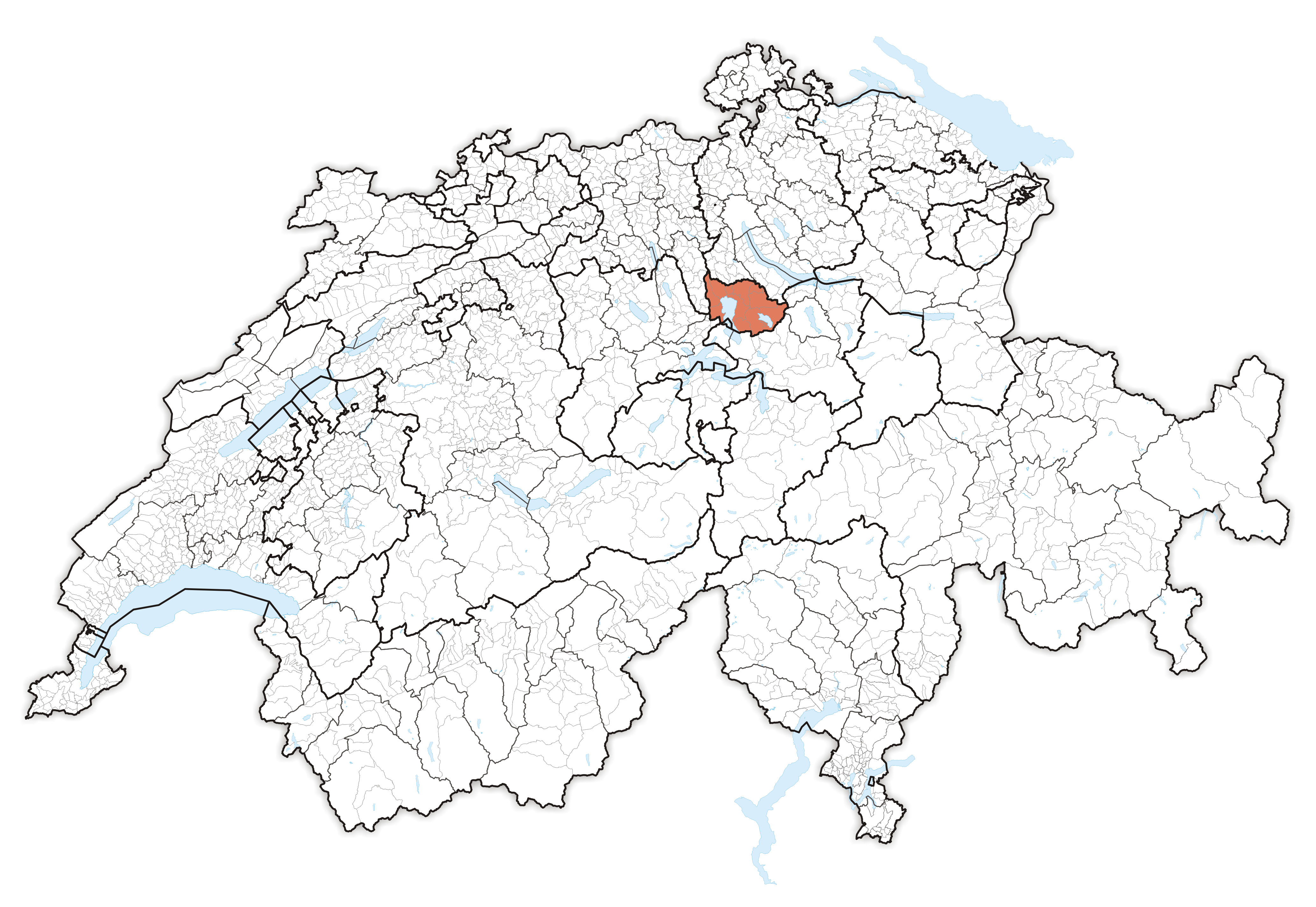 Canton Zug